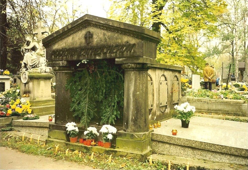 Grobowiec rodziny Estreicherów, w którym spoczywa prezes TPSP, Karol Estreicher Młodszy.